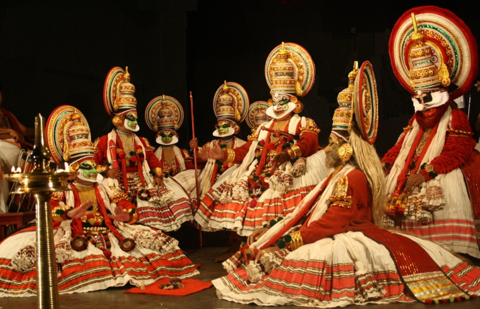 കൗരവ-പാണ്ഡവർ ചൂതുകളിയിൽ